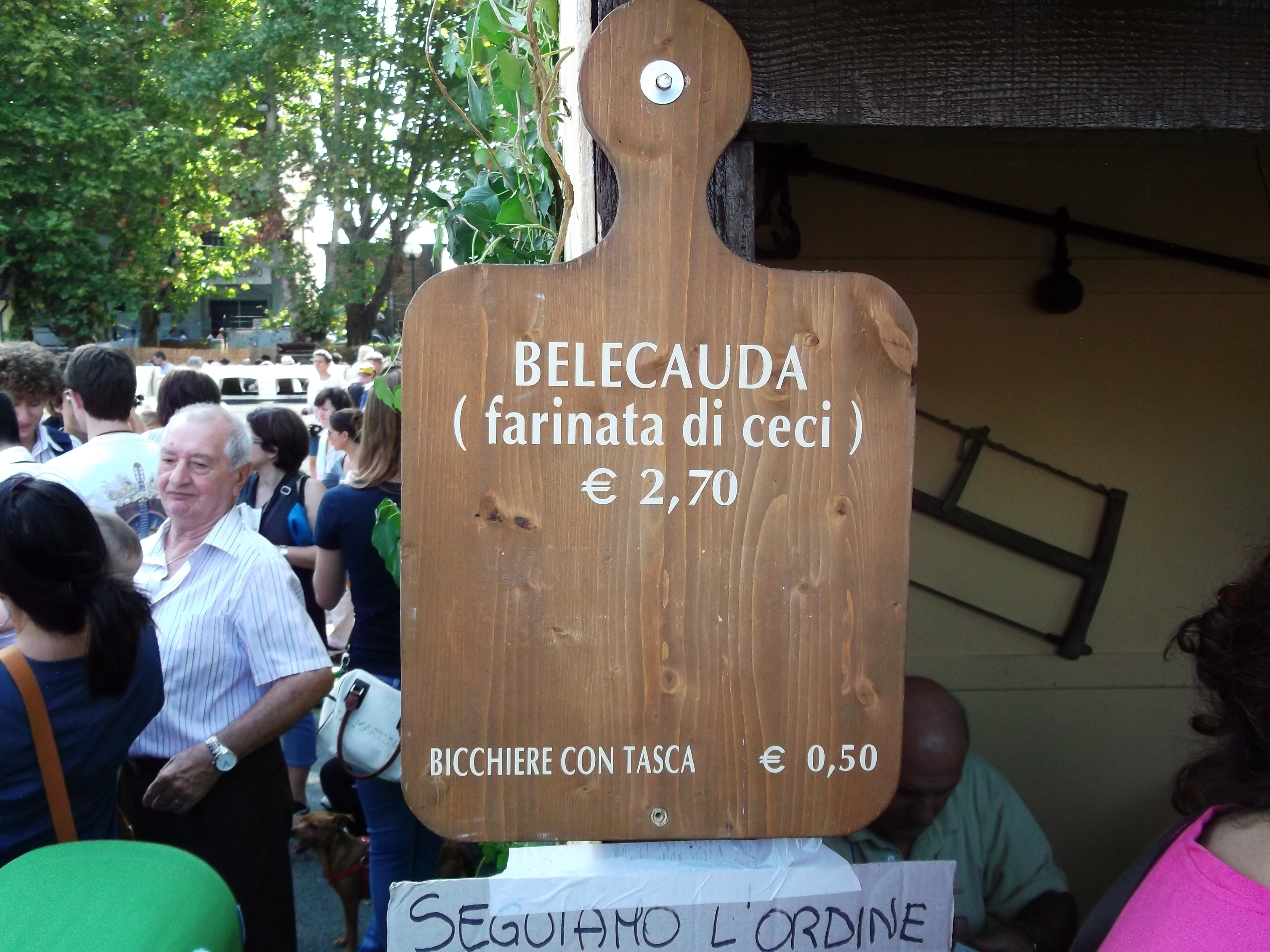 prezzario di uno dei molteplici piatti locali